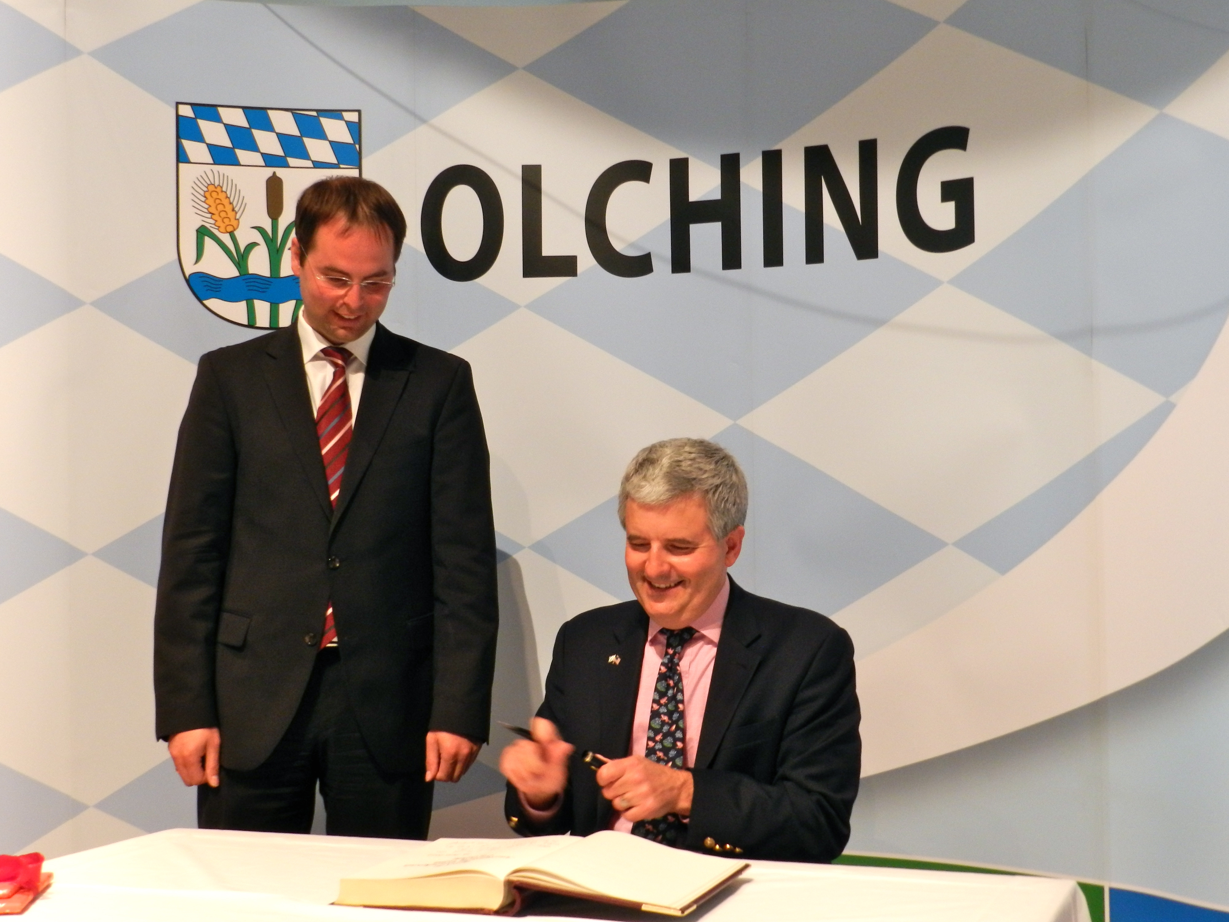 Andreas Magg, Bürgermeister von Olching und US-Generalkonsul Conrad Tribble. Generalkonsul Tribble trägt sich in das Buch der Stadt ein